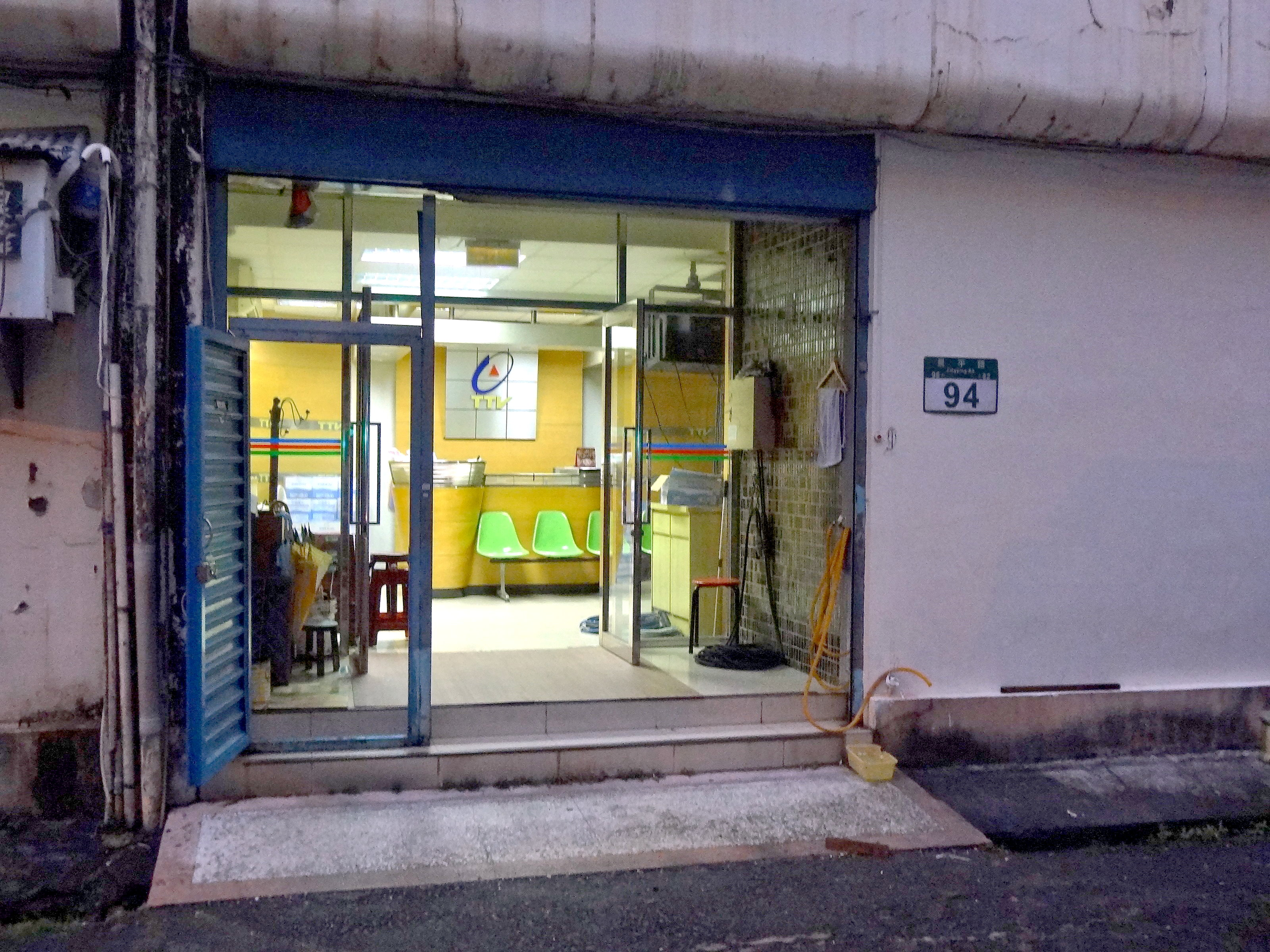 臺灣電視公司中和攝影棚大門夜景。